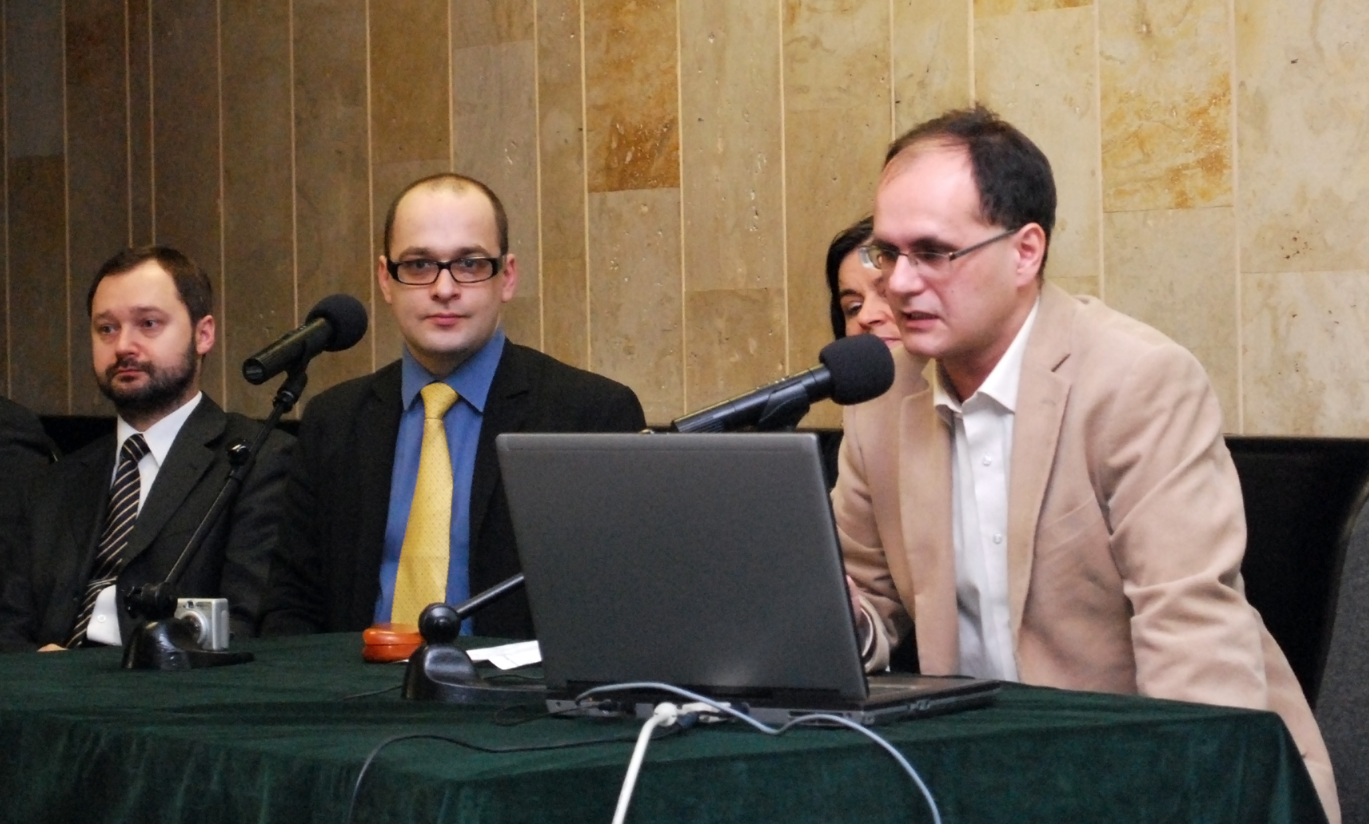 Dzień Domeny Publicznej 2008 - Warszawa, Biblioteka Narodowa [1] Polimerek o Koalicji Otwartej Edukacji